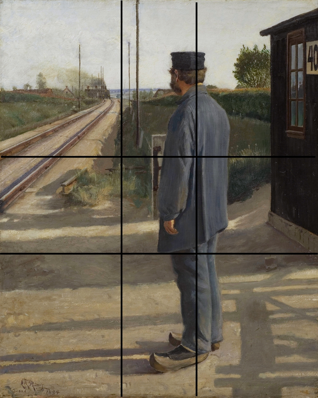 Andersen Ring 1884 det gyldne snit